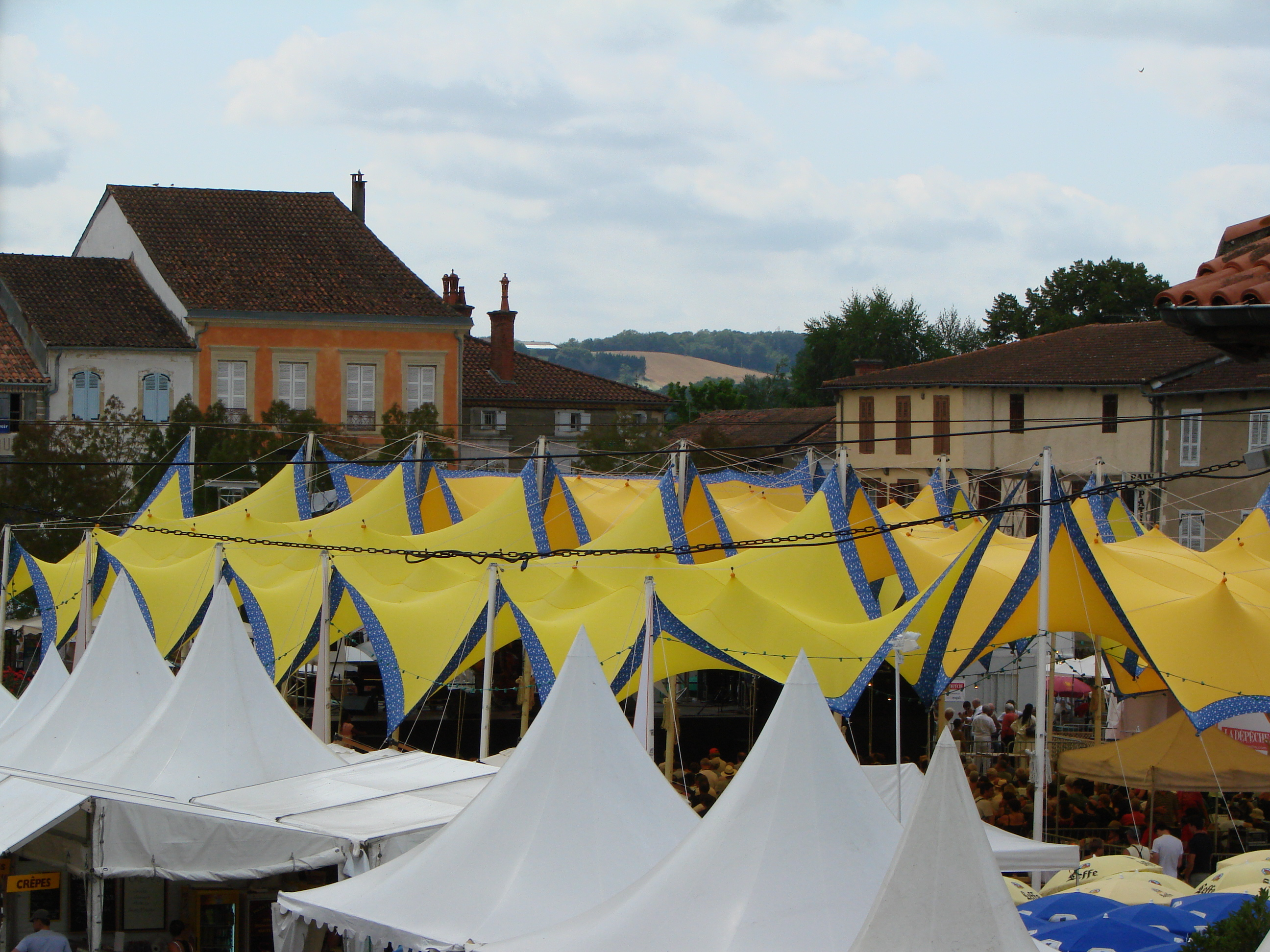 Village de Marciac dans le Gers (France) : Chapiteaux du festival off sur la place centrale du village